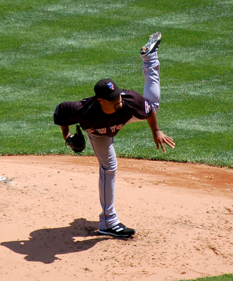 Johan Santana on May 17, 2008